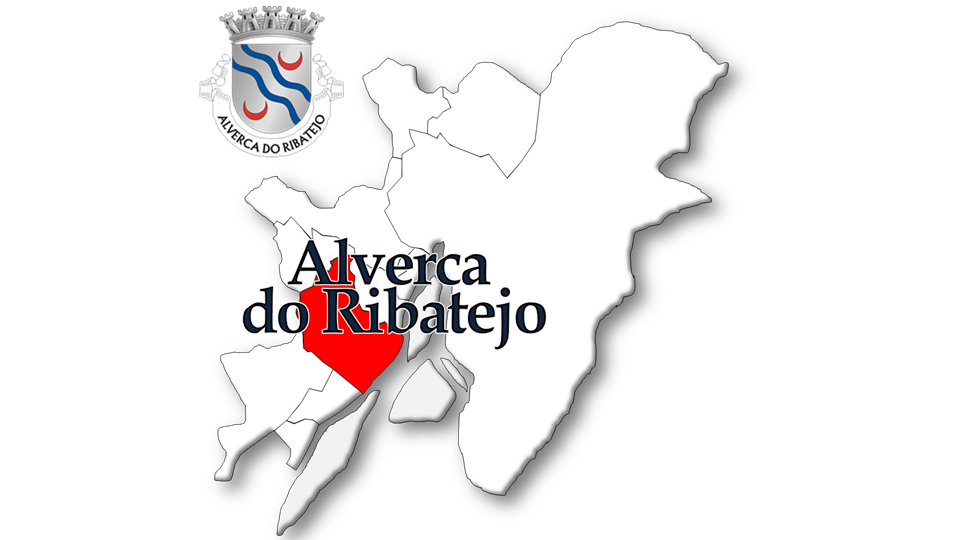 Evolução da População